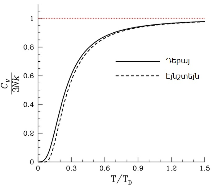 Դեբայի և Էյնշտեյնի մոդելների համեմատությունը պինդ մարմնի ջերմունակության համար։